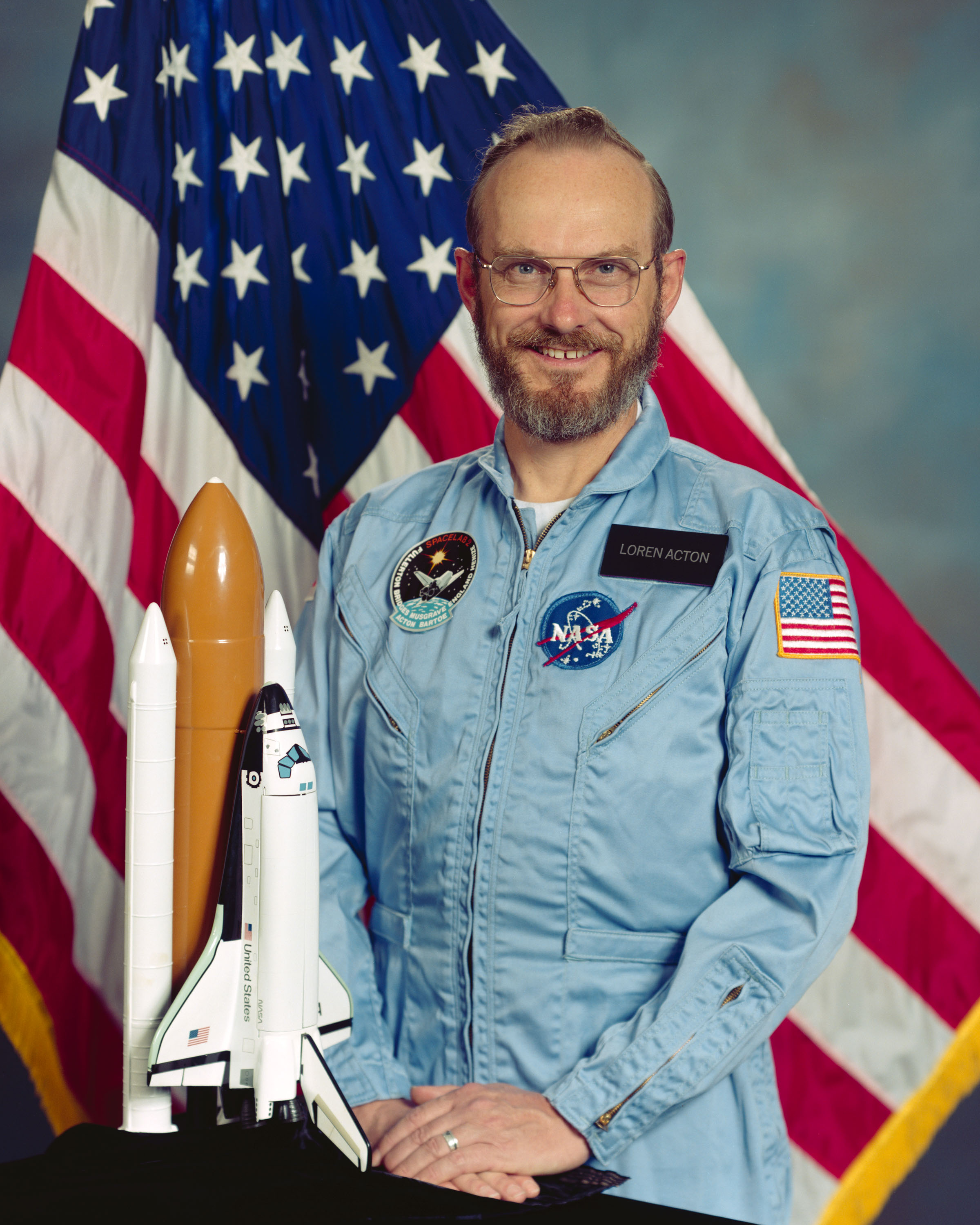 offizielles Portrait von Payload Spezialist Loren Acton (JSC 1985)